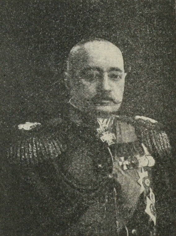 Это изображение было использовано для иллюстрирования статьи «Диков, Иван Михайлович» опубликованной в девятом томе «Военной энциклопедии», который был издан книгоиздательским товариществом И. Д. Сытина в 1912 году в столице Российской империи городе Санкт-Петербурге.